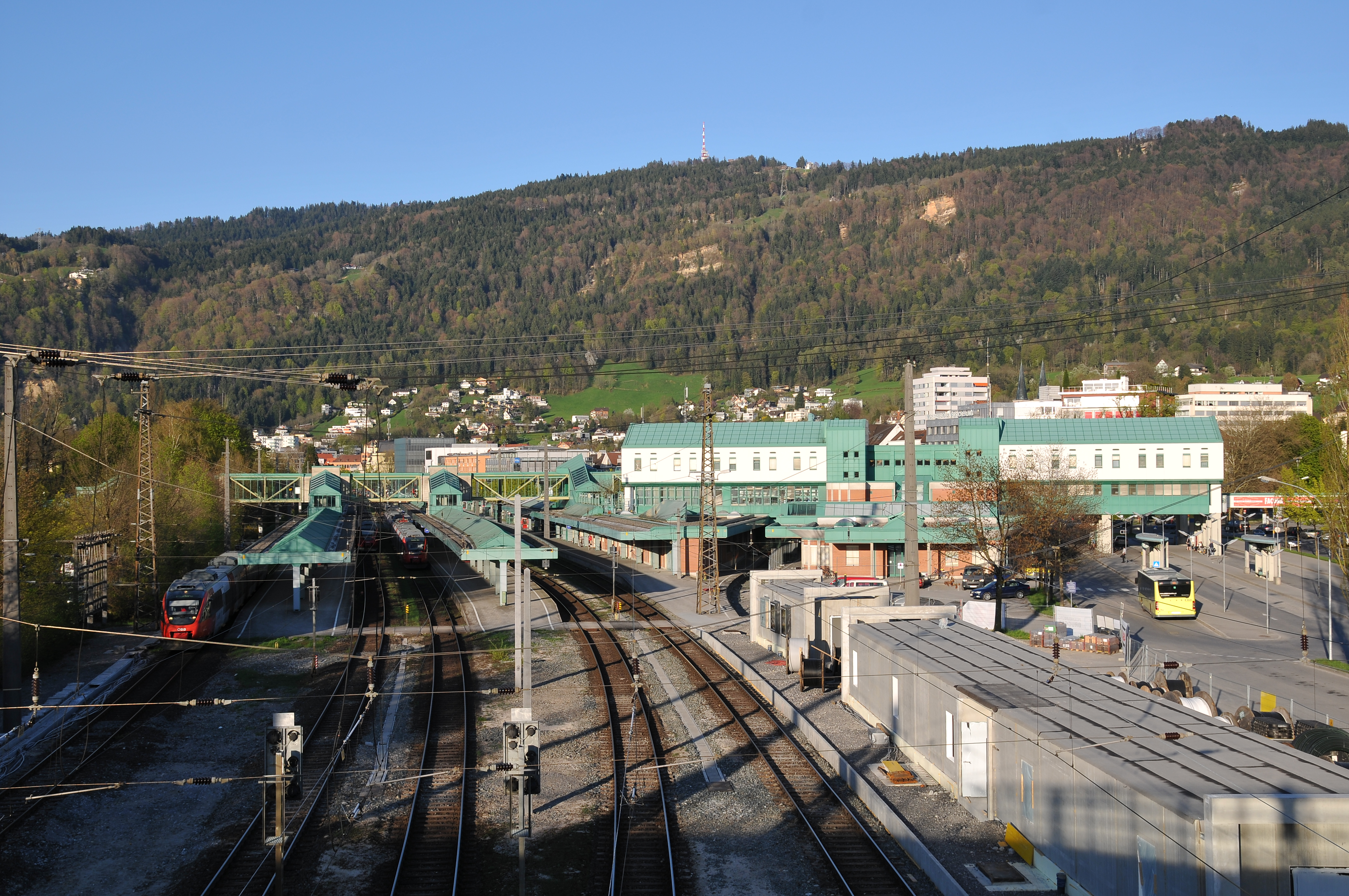 Hauptbahnhof Bregenz Blick von der Brücke Mehrerauerstraße in Richtung Pfänder.